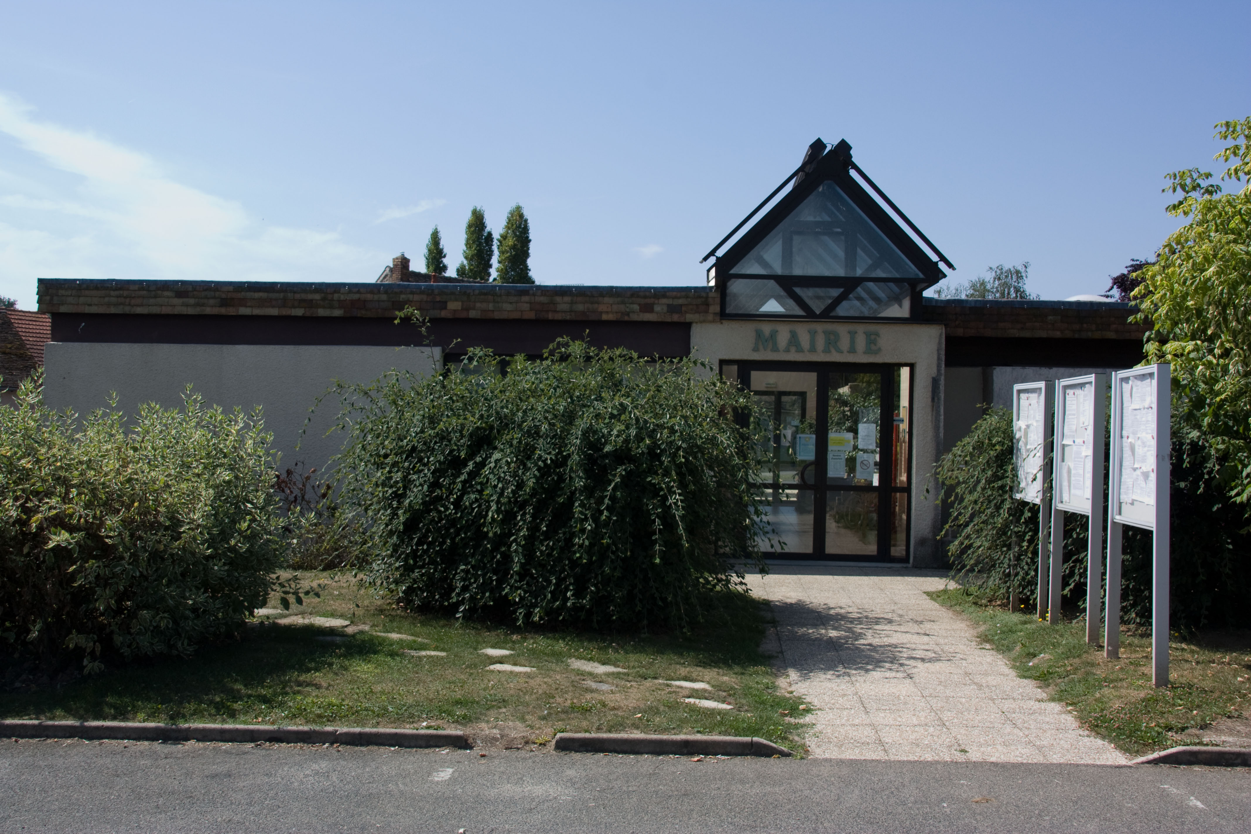 Mairie de Champcueil, Champcueil, Essonne, France